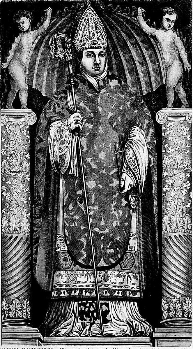 Bishop Samuel Maciejowski 1499-1550